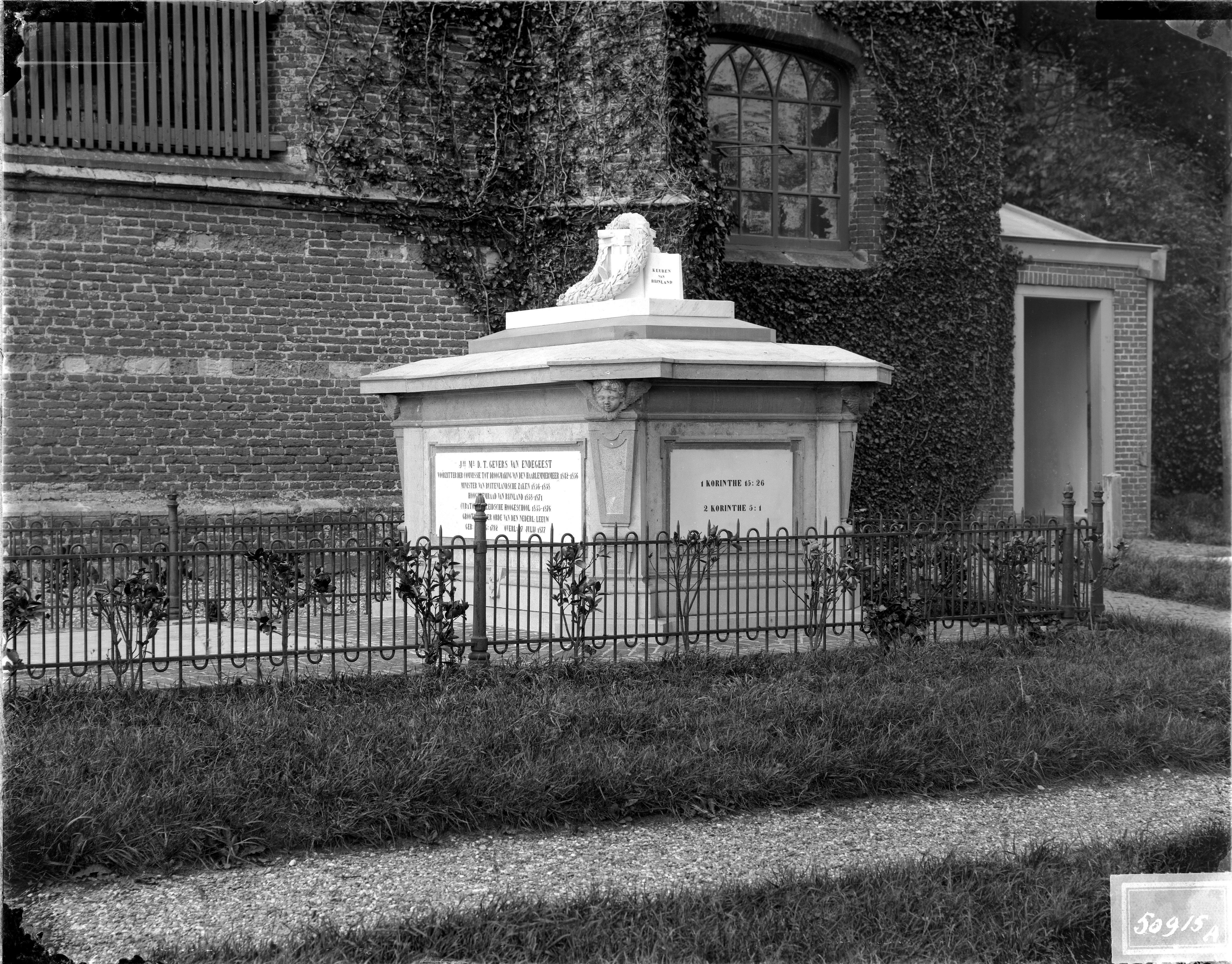 Jhr. Mr. Daniel Theodore Gevers van Endegeest (1792-1877). Minister van Buitenlandse Zaken, Hoogheemraad van Rijnland, Curator van de Leidse Universiteit. Zijn grafmonument, vervaardigd door Jacques Timmermans, bij het Groene Kerkje te Oegstgeest.